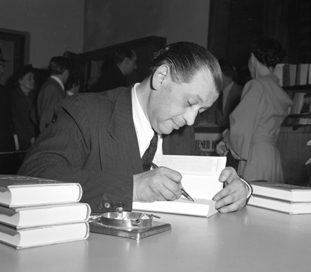 US-Information Center in Wien 1., Kärntnerstraße 38.: Friedrich Torberg signiert sein Buch Die zweite Begegnung.